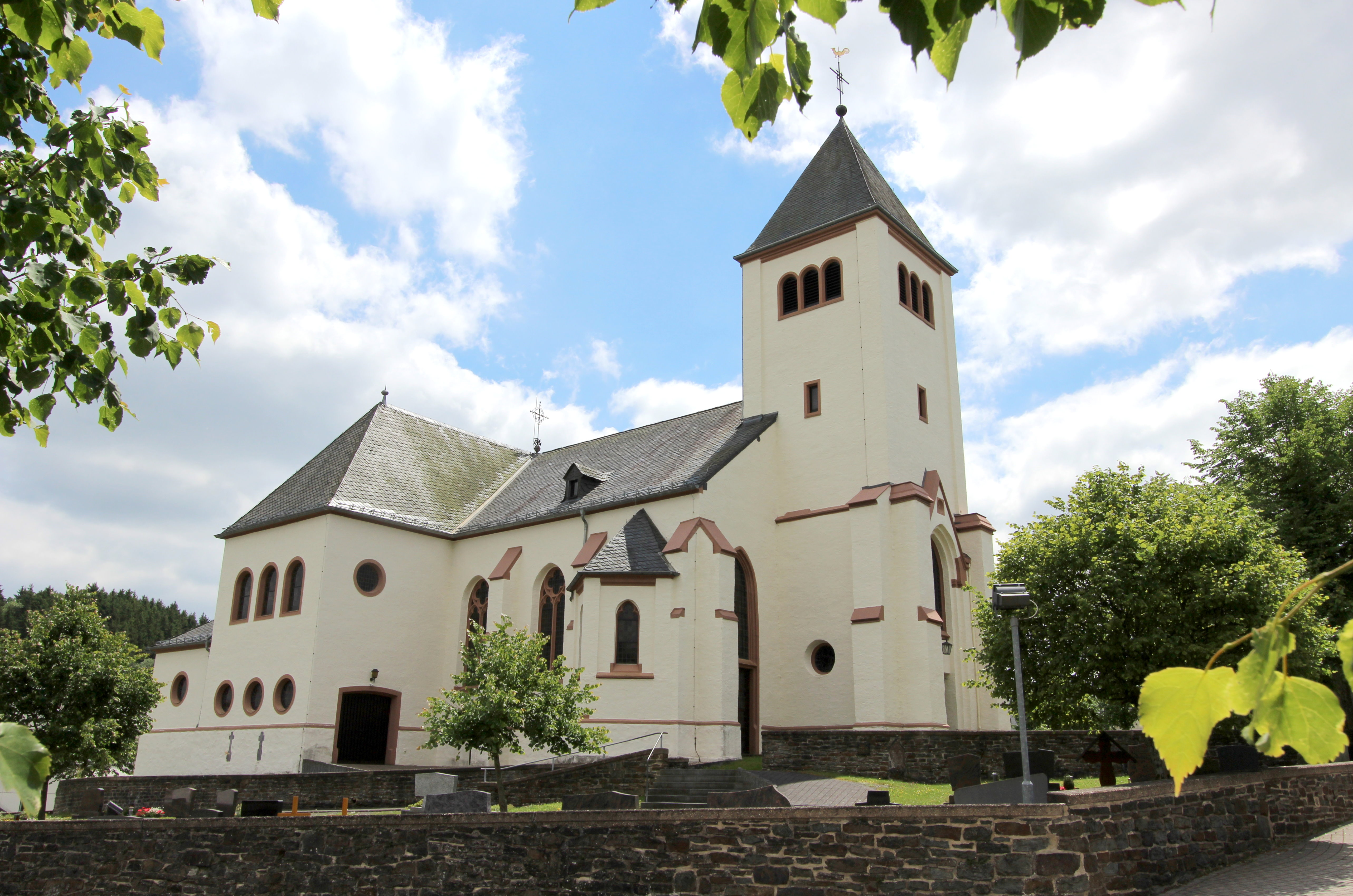 54611 Hallschlag, Trierer Straße 1. Neugotischer Bau, 1867, Architekt Vincenz Statz. Aufnahme von 2017.